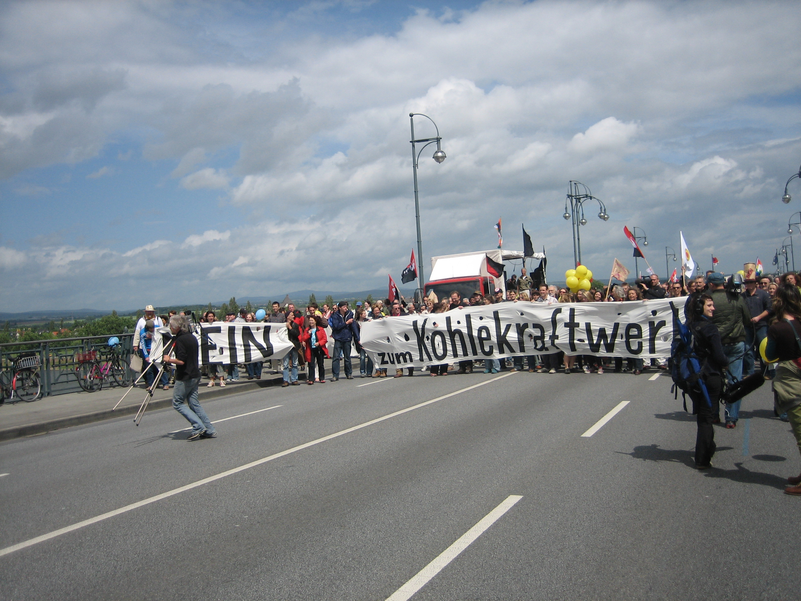 Demonstration gegen das geplante Kohlekraftwerk Main/Wiesbaden, Transparent mit der Aufschrift "Nein zum Kohlekraftwerk".